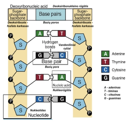 Nukleotidų jungtys